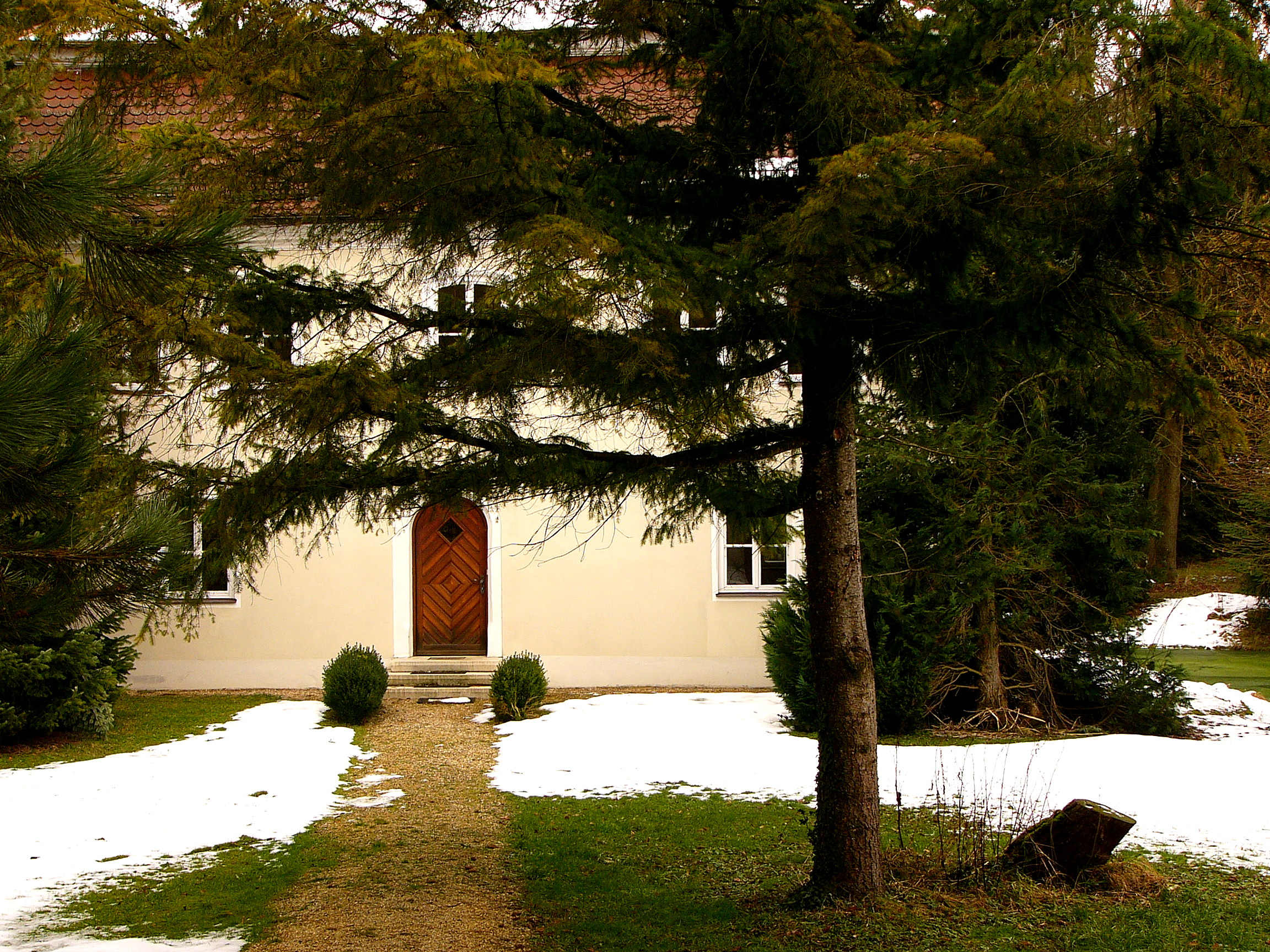 Wasserschloss; barocker zweigeschossiger Bau mit Mansard-Halbwalmdach, von 1729, zum Teil von Weiheranlage umgeben. This is a photograph of an architectural monument.